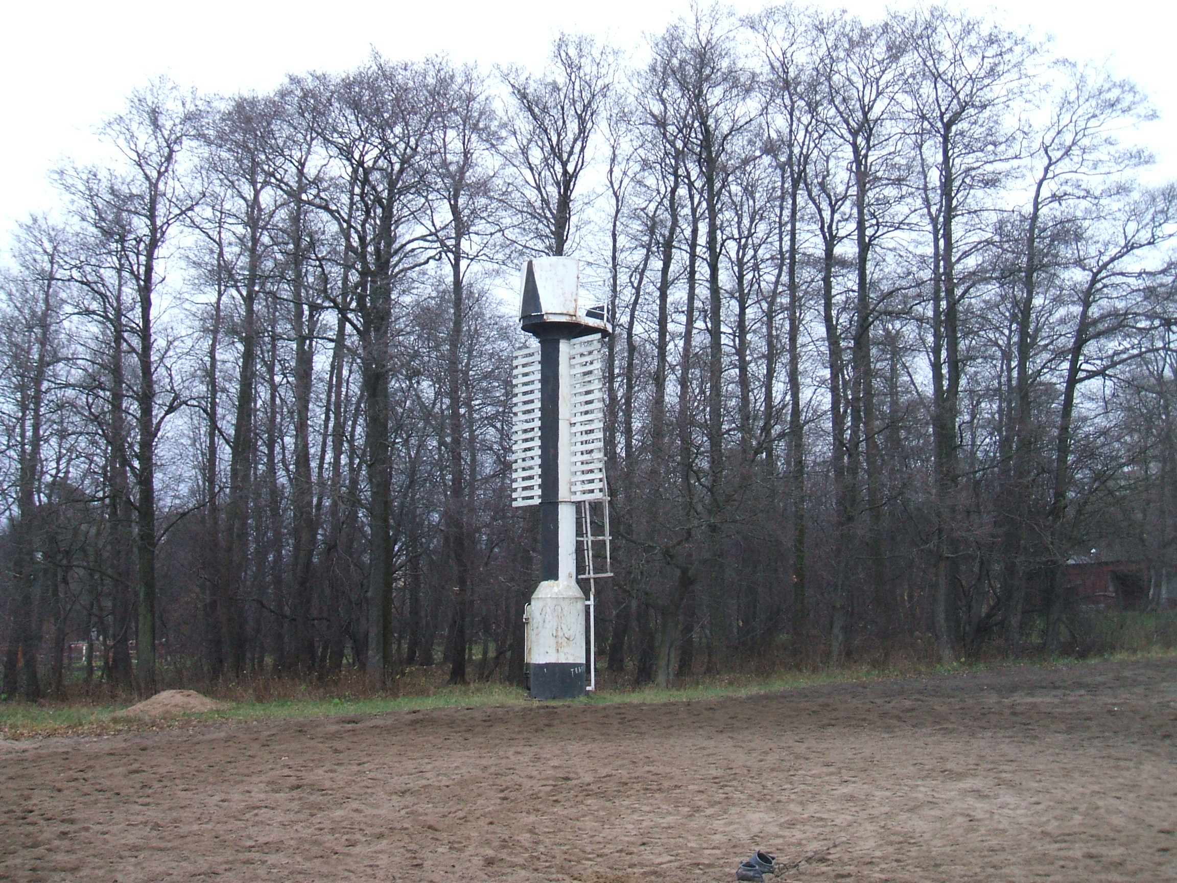 Сестрорецк СПб Маяк в парке Сестрорецкие "Дубки"